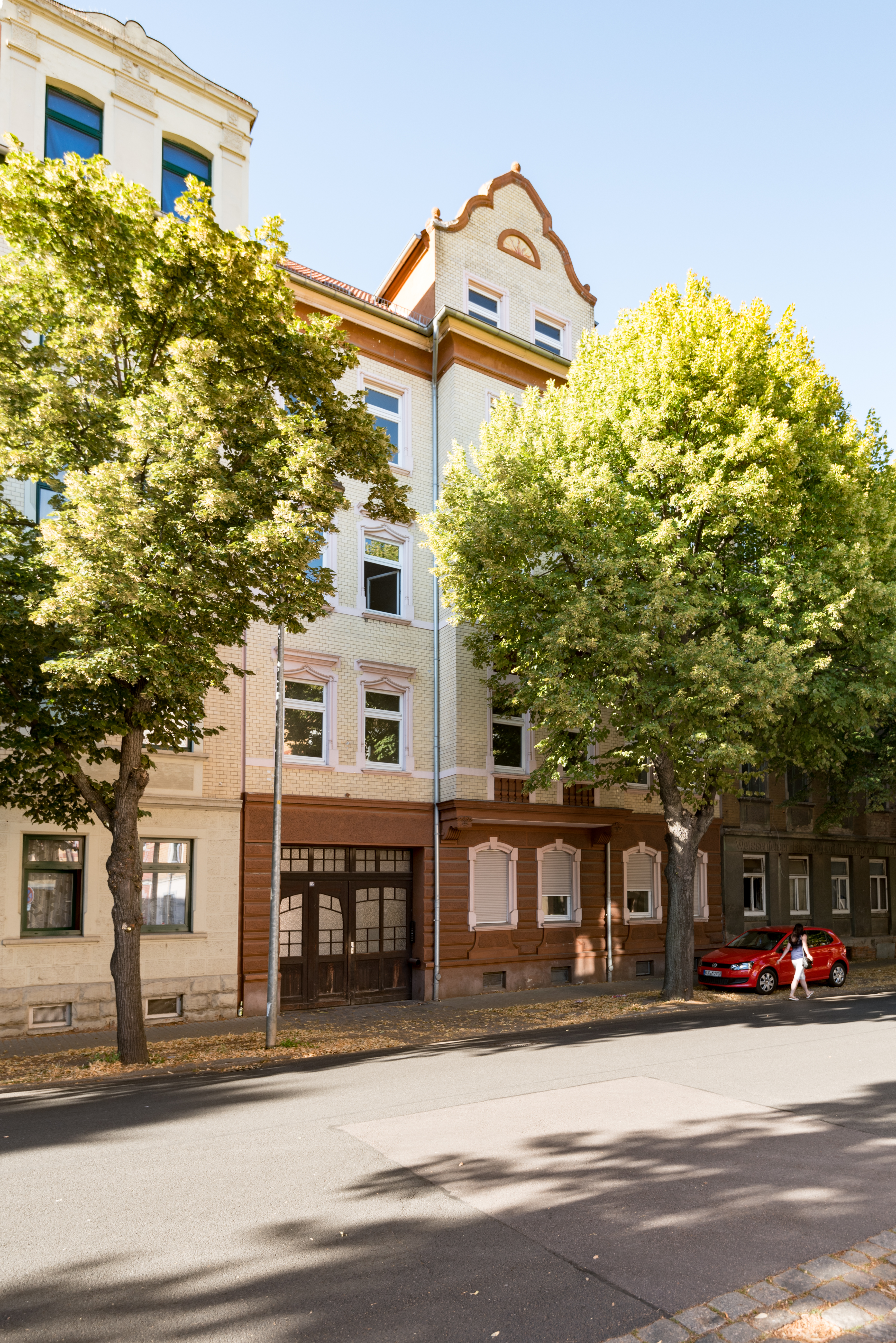 Weißenfels, Beuditzstraße 55